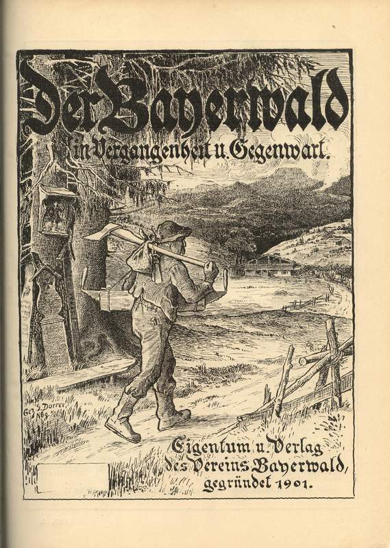 Titelblatt der Zeitschrift "Der Bayerwald"